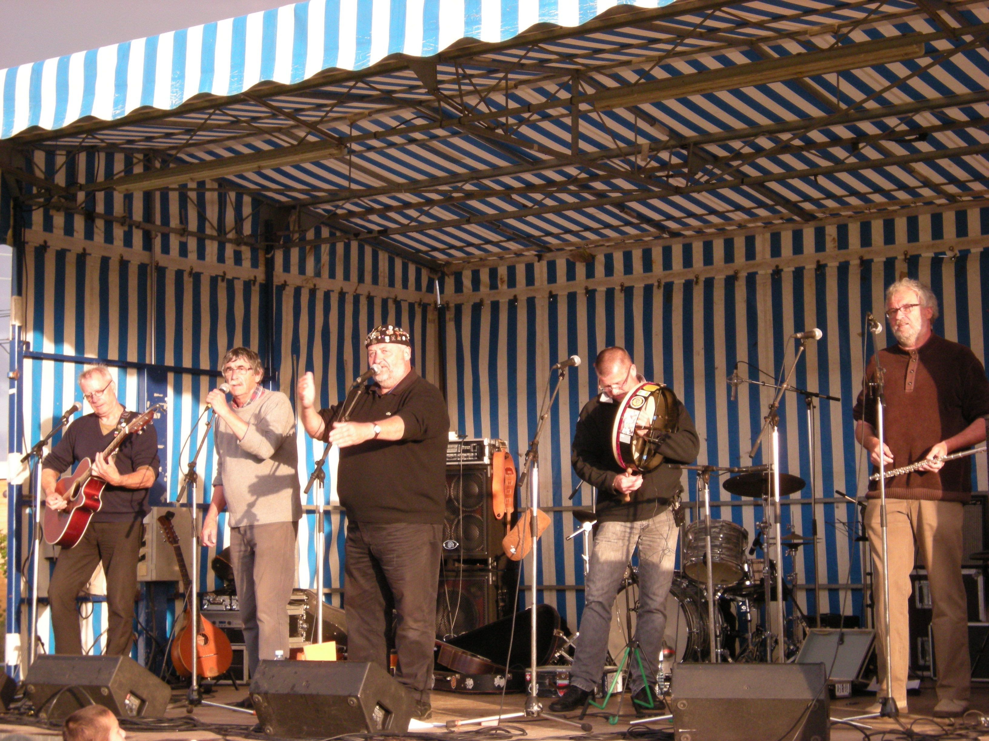 Le groupe de chanteurs de chants de marins Les Souillés de fond de cale de la région de Paimpol